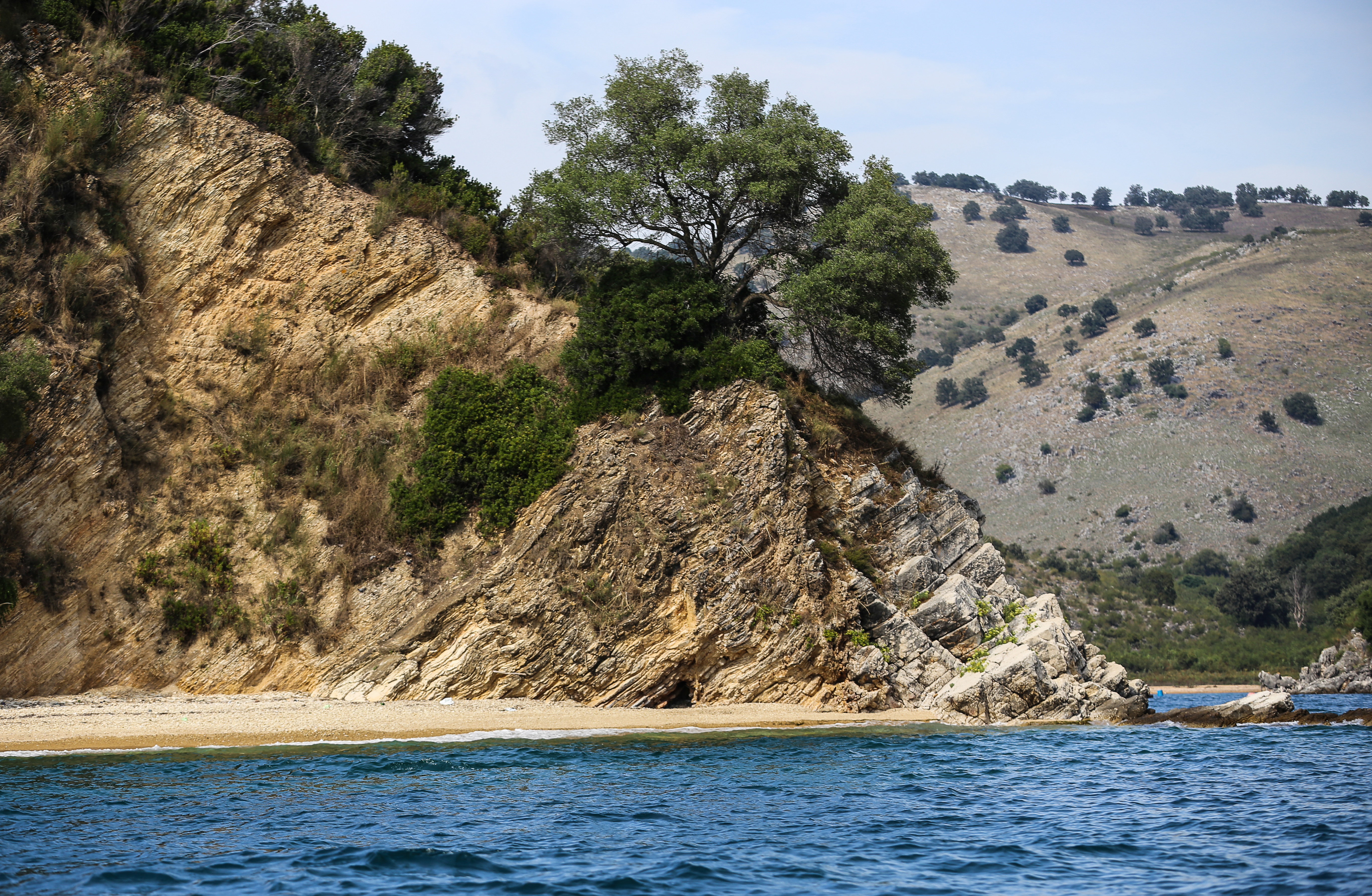 Kanaii Qukes-Butrint-Kepi Stillos, Sarande